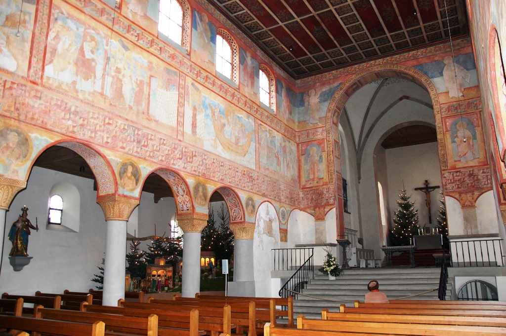 Innenraum der Klosterkirche St. Georg